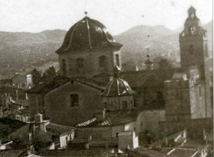 Vista panorámica de la antigua Iglesia de Santa Ana de Elda